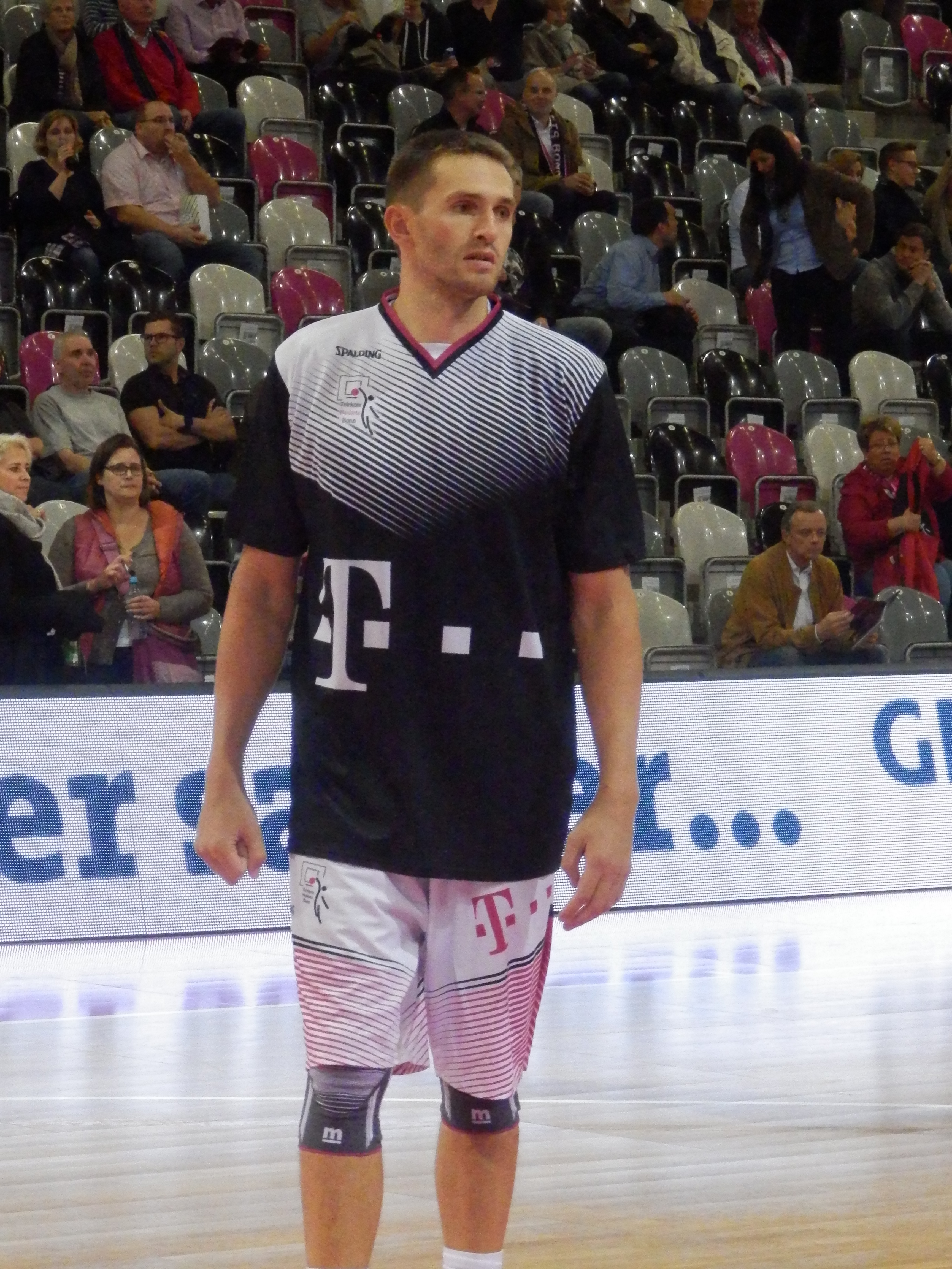 Tadas Klimavicius beim Spiel der Telekom Baskets Bonn gegen den MBC am 7. Oktober 2015.